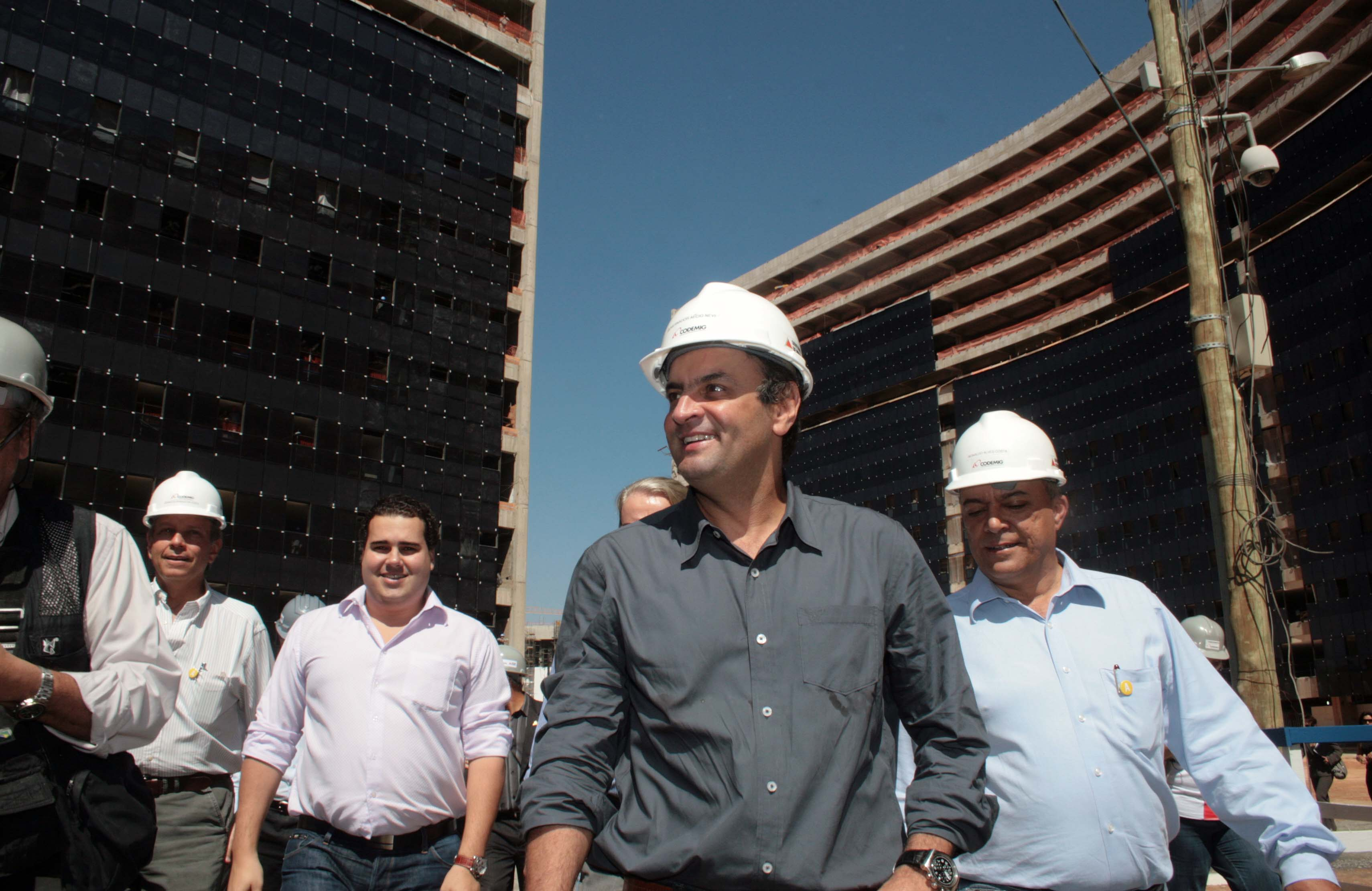 Aécio Neves (PSDB-MG) em visita a obras da Cidade Administrativa.